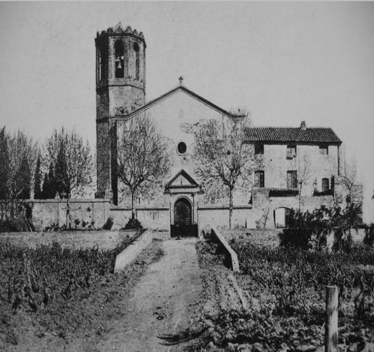 Antigua Iglesia de Sant Marti a Serraparera principios Siglo XX